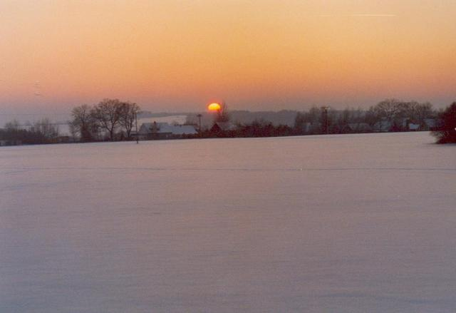 Obec Vísky v zimě Pořízeno 8.2.2005 (vlastní foto)